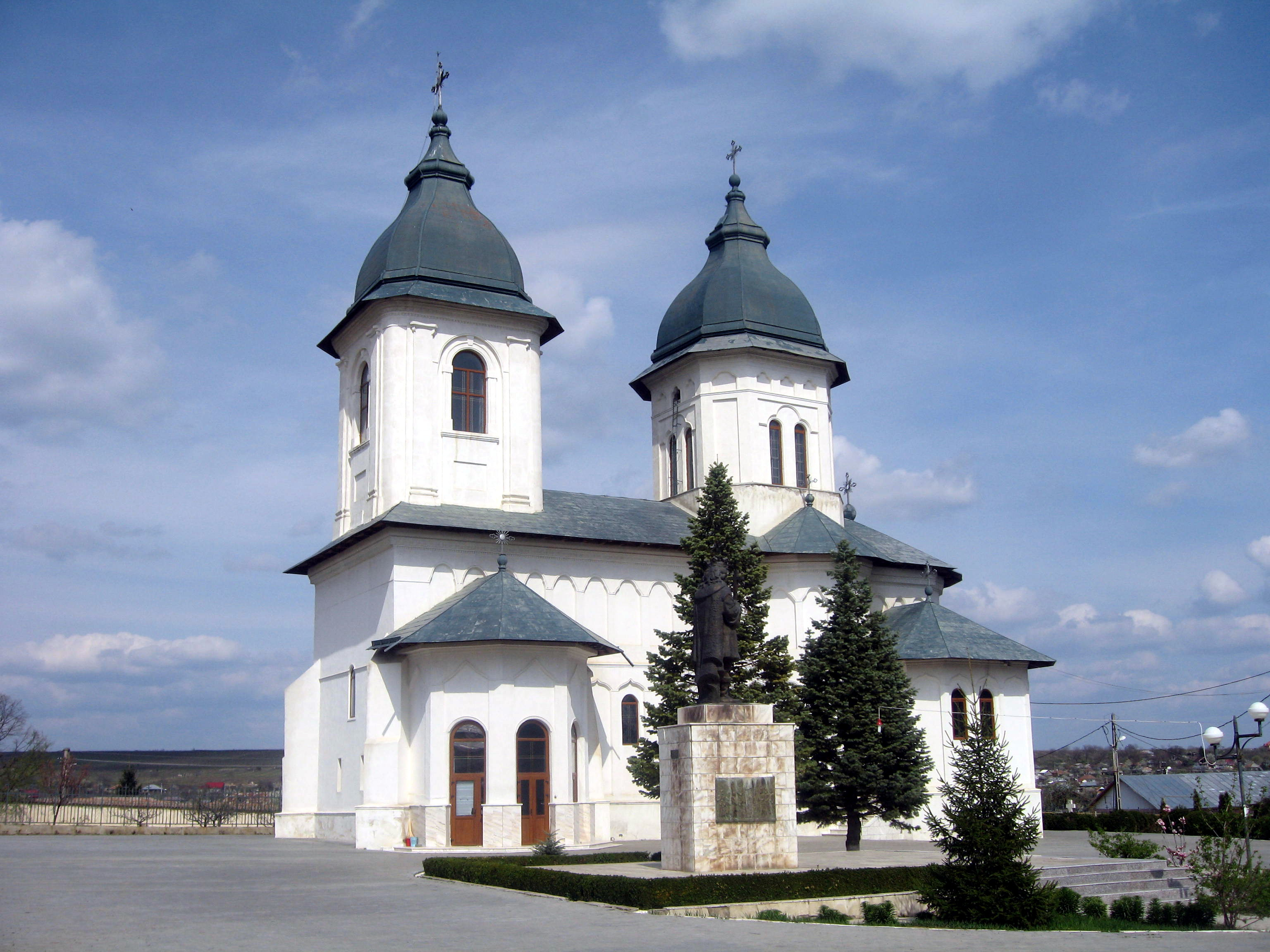 Catedrala din Husi, Vaslui County, Romania